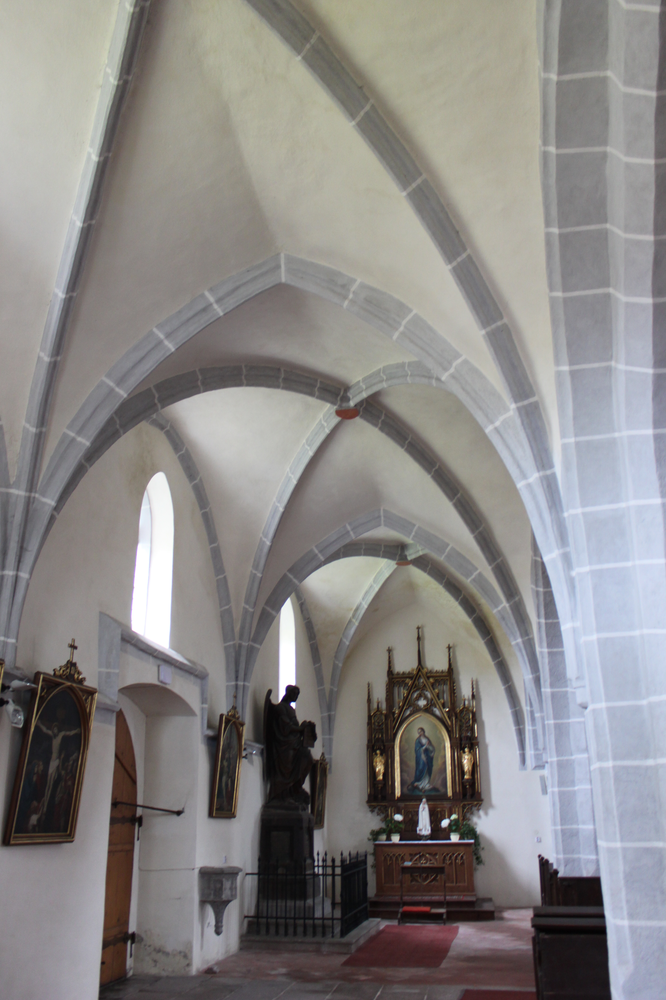 Kostel sv. Jakuba v Nepomuku, boční loď